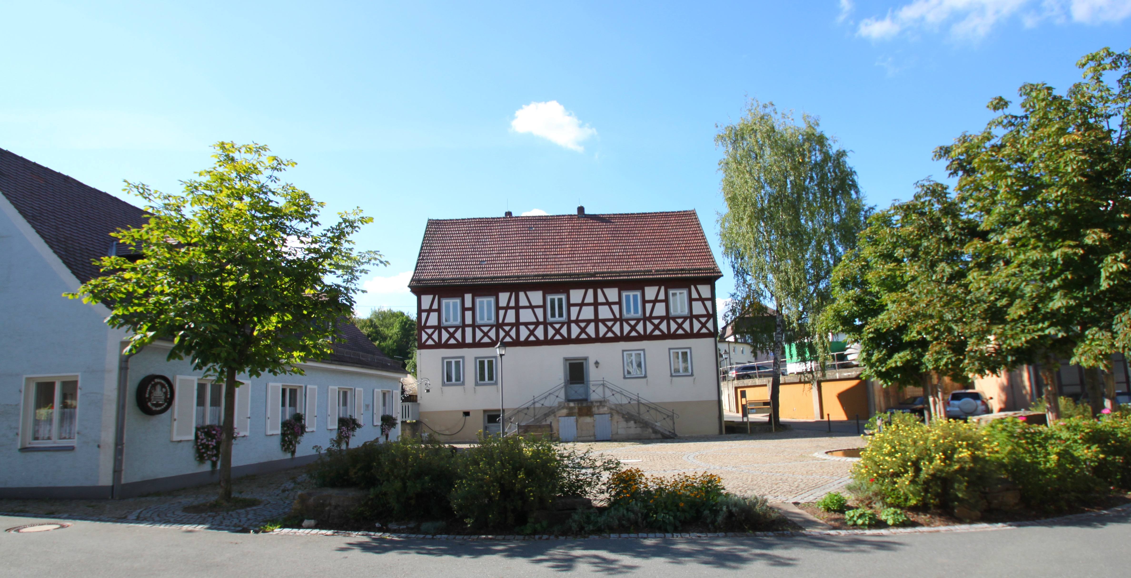 Weißenbrunn, Paradiesplatz mit altem Rathaus und Brauer- und Büttnermuseum